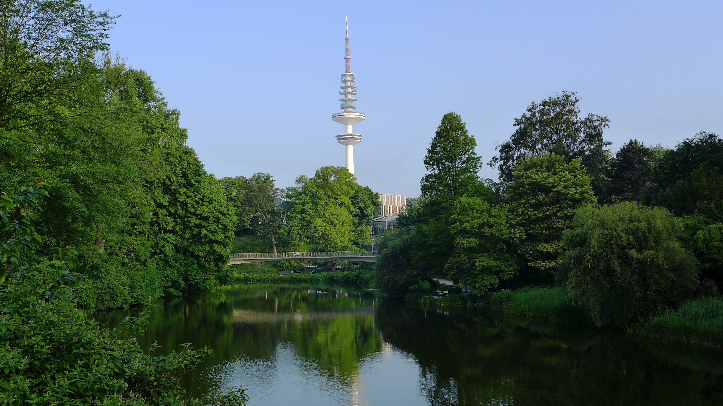 Hamburg: Blick vom Stephansplatz über Alter Botanischer Garten (heute Planten un Blomen) zum Heinrich-Hertz-Turm.